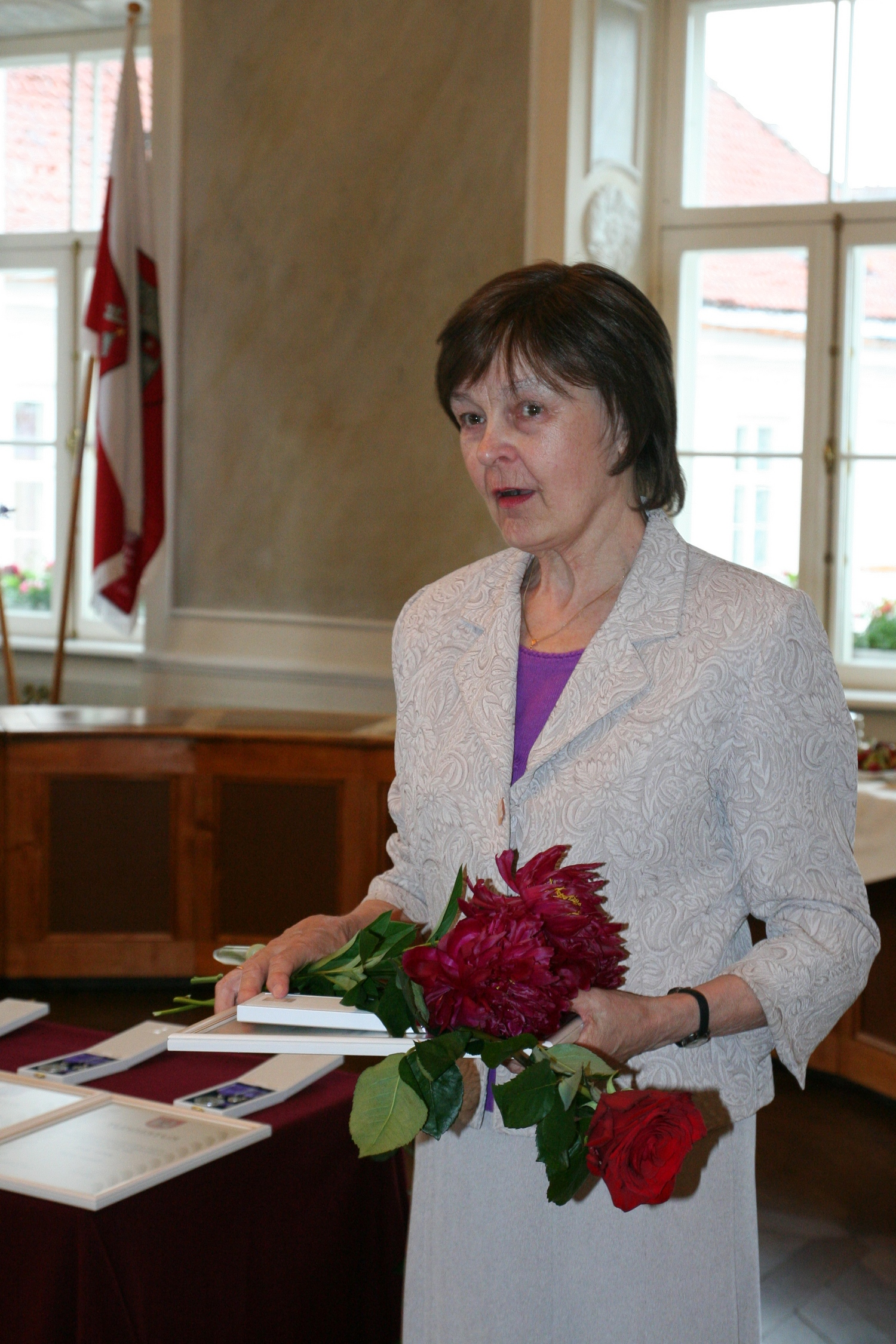 Ene Ahven, Tartu Ülikooli Akadeemilise Naiskoori koormeister, Tartu medalite üleandmisel 29. juunil 2014